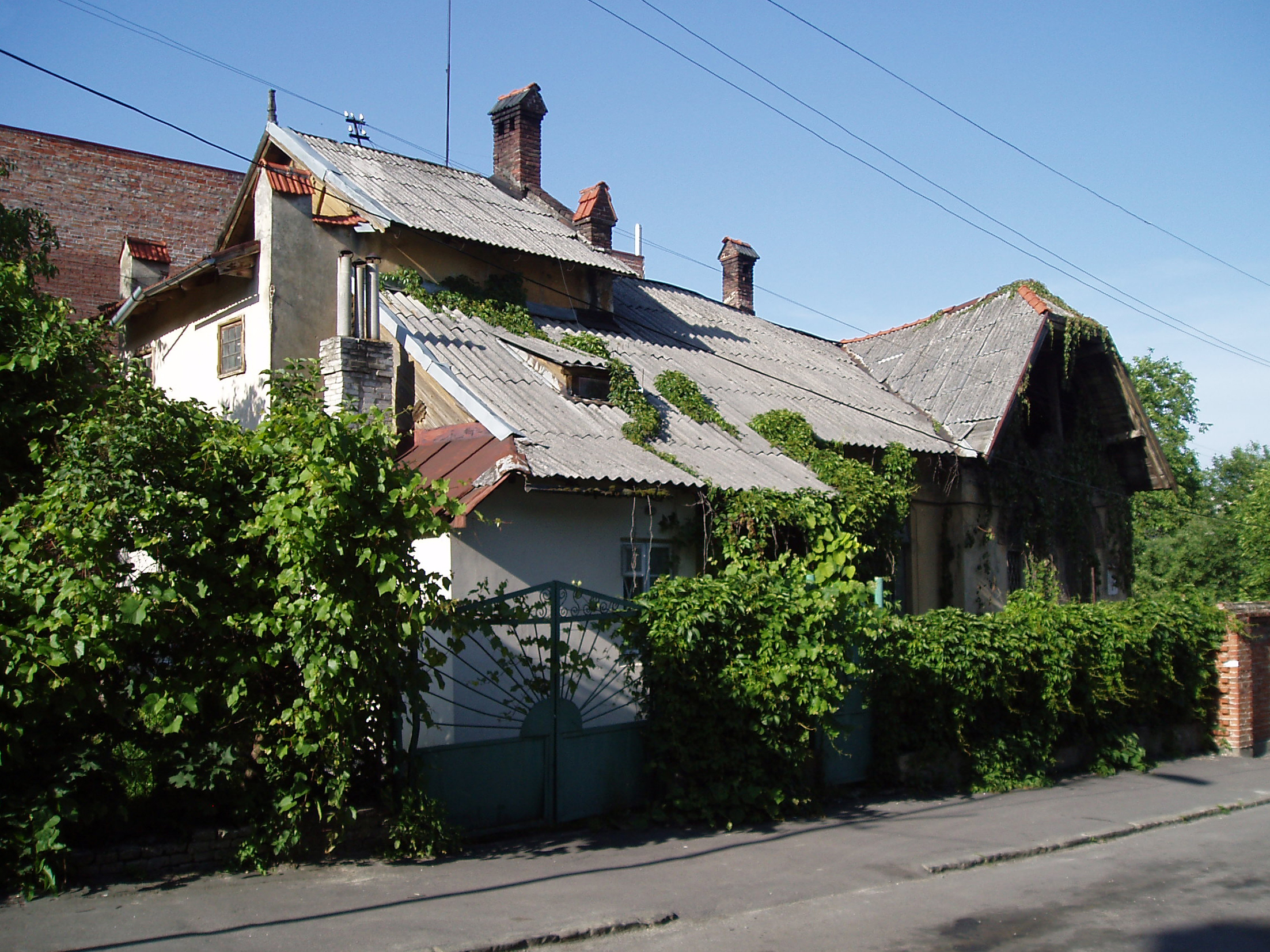 Будинок № 3 на вулиці Запольської у Львові. Колишня вілла «Скіз» Габріелі Запольської.